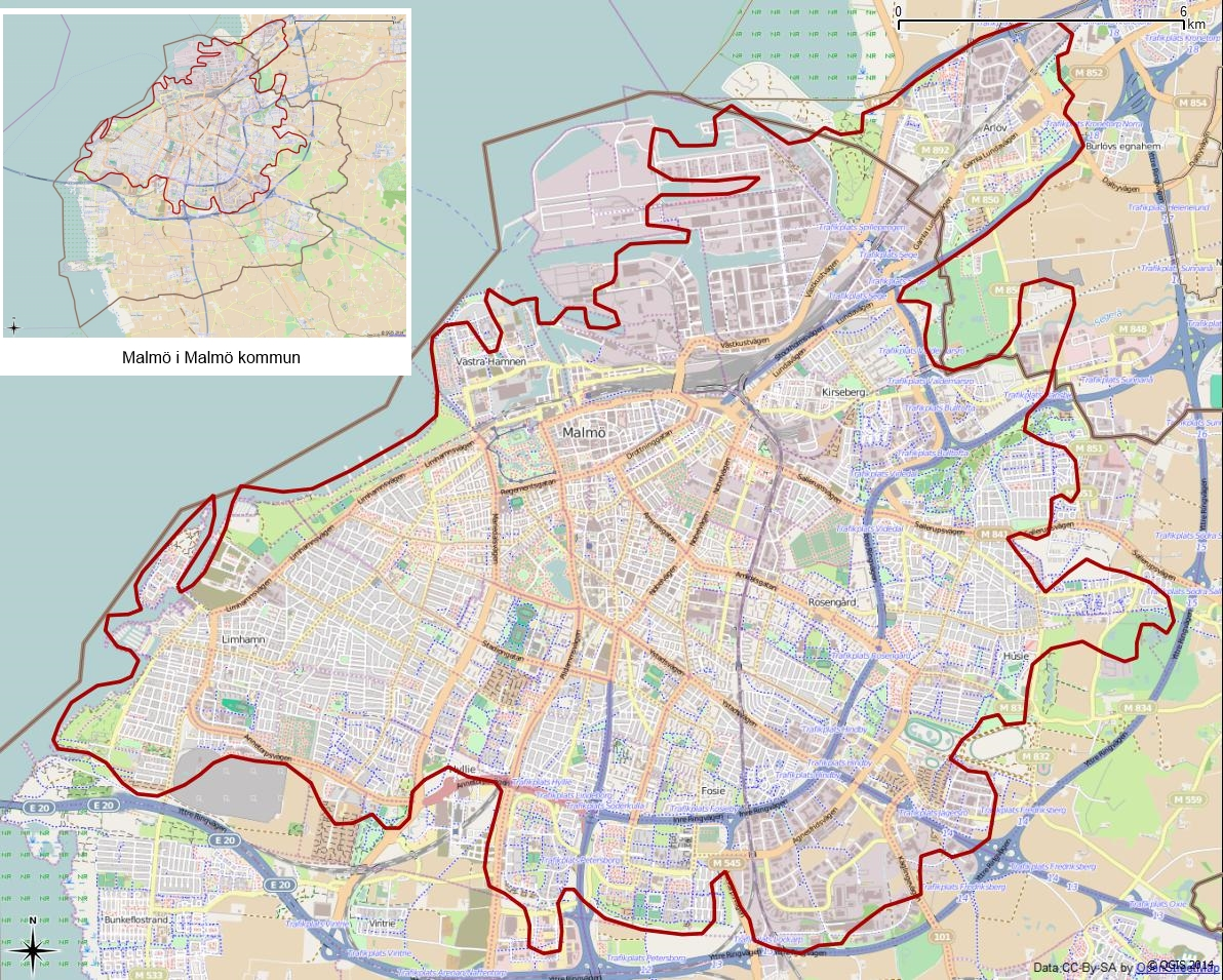 Tätorten Malmös gränser 1990 enligt Atlas över rikets indelningar 1992.